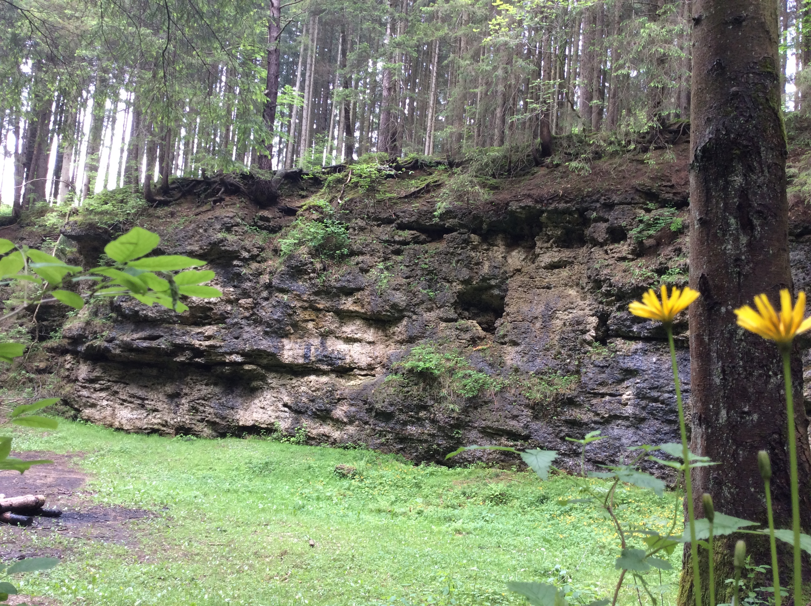 Ehemaliger Nagelfluh Steinbruch im Gleissental